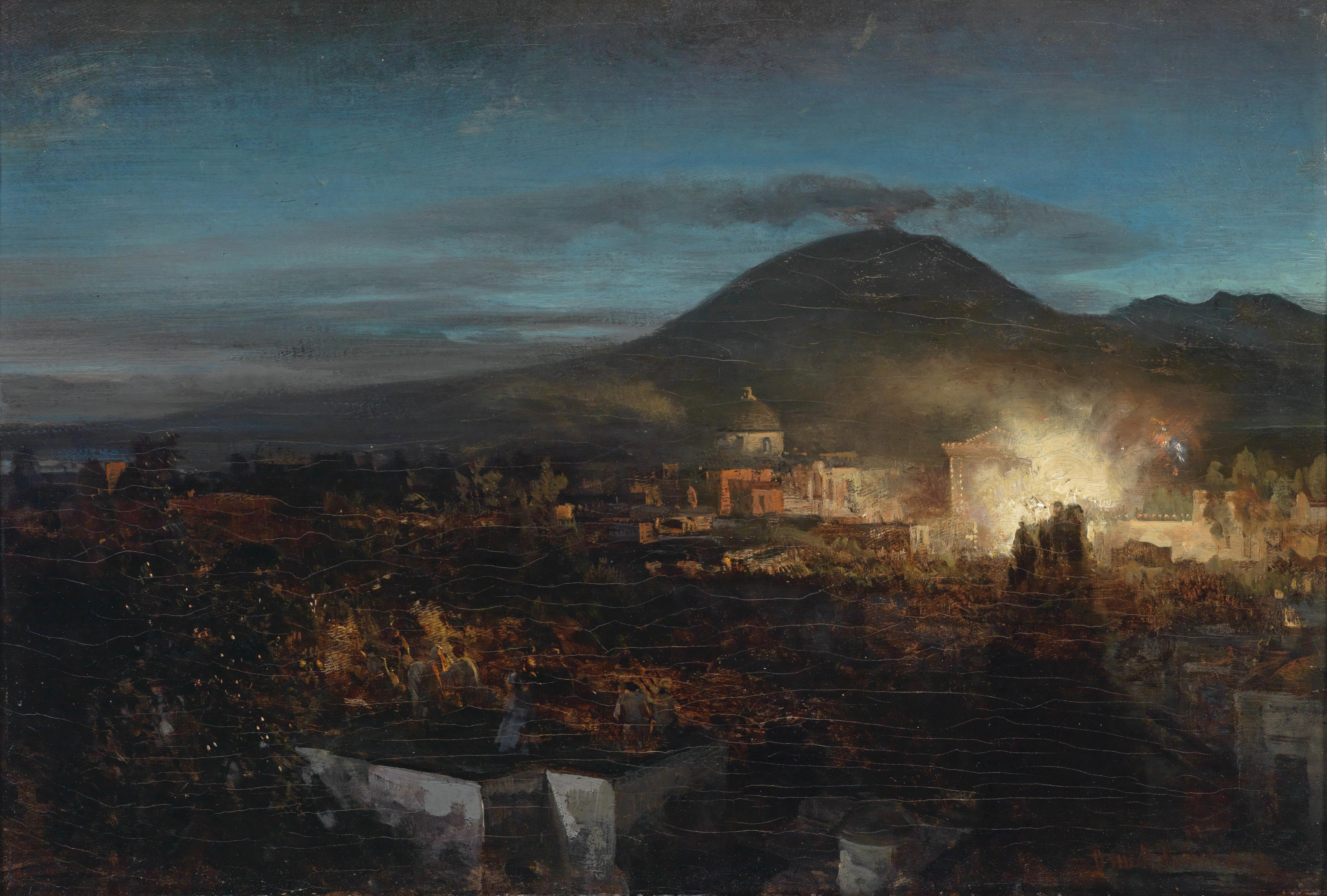 Feuerwerk in Torre dell Annunziata bei Neapel